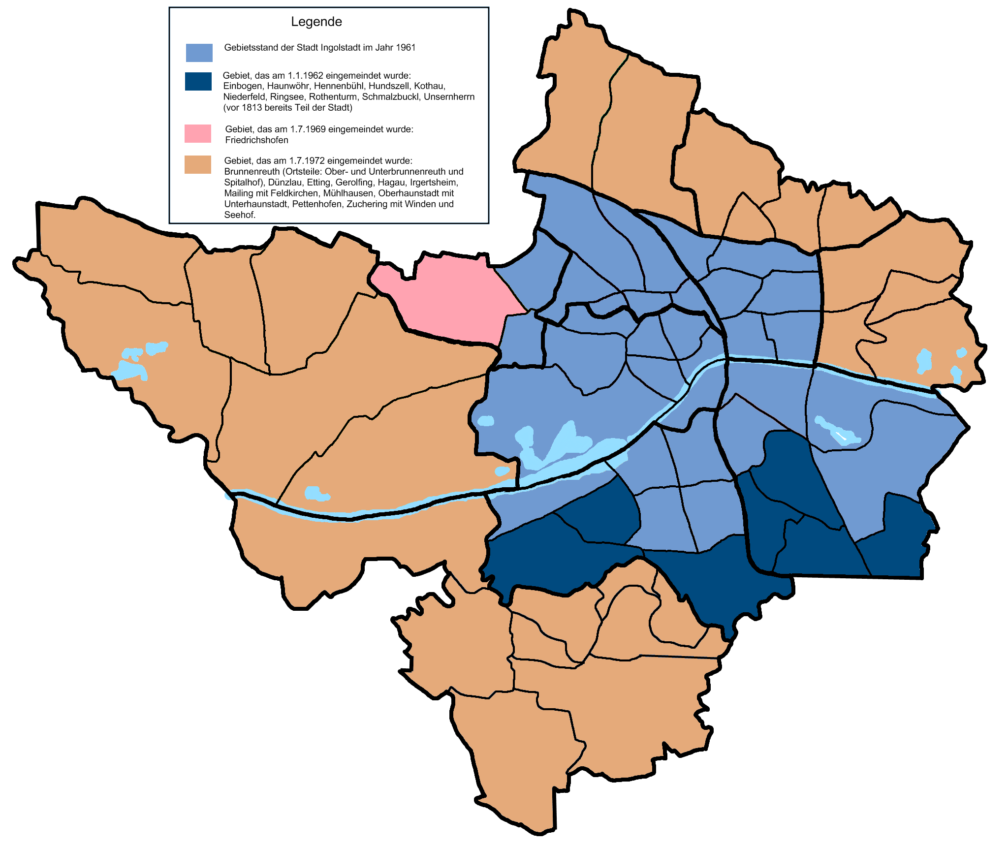 Nach 1962 von Ingolstadt eingegliederte Gebiete